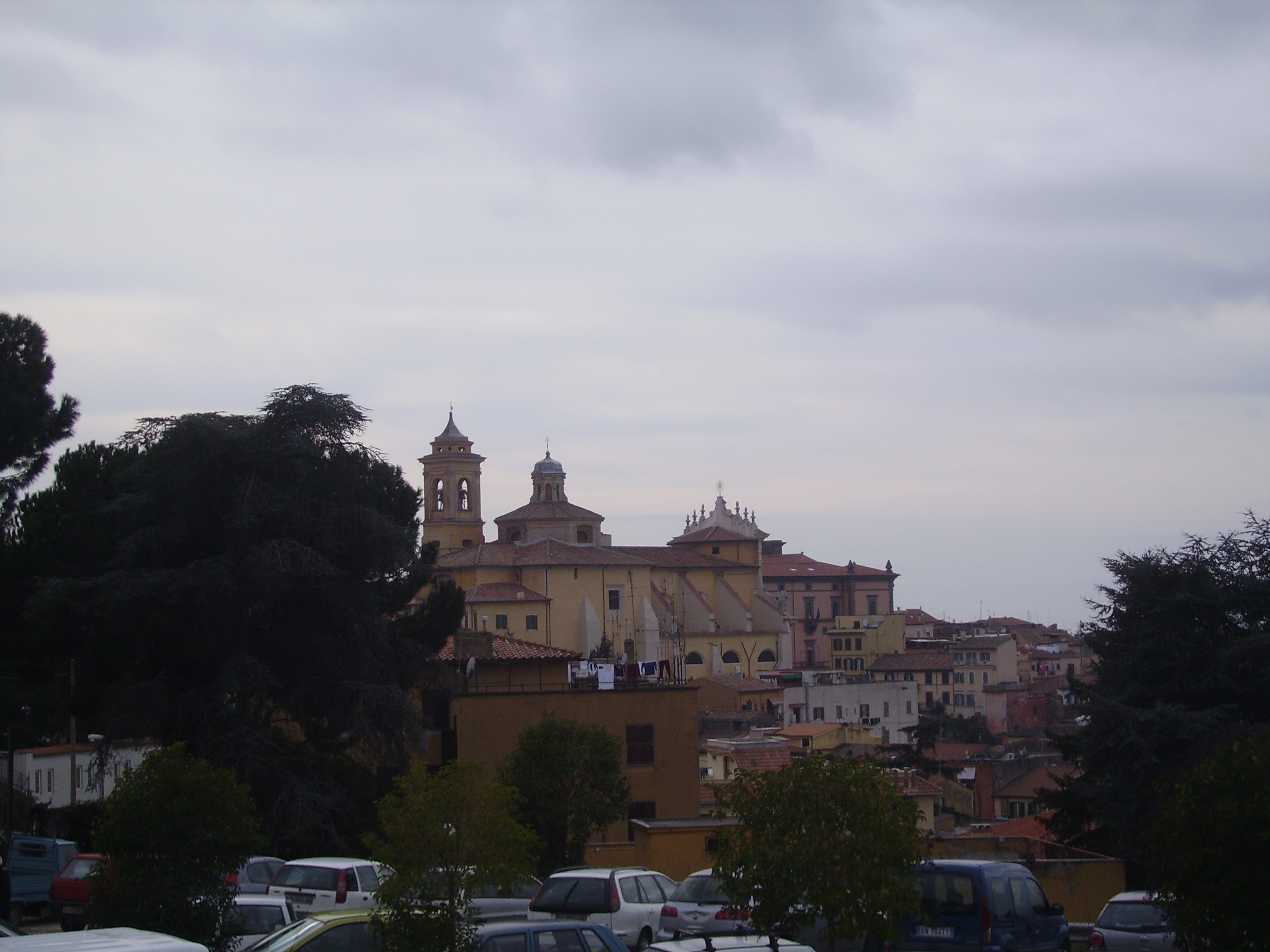 veduta del centro da Via Santa Rosa Venerini